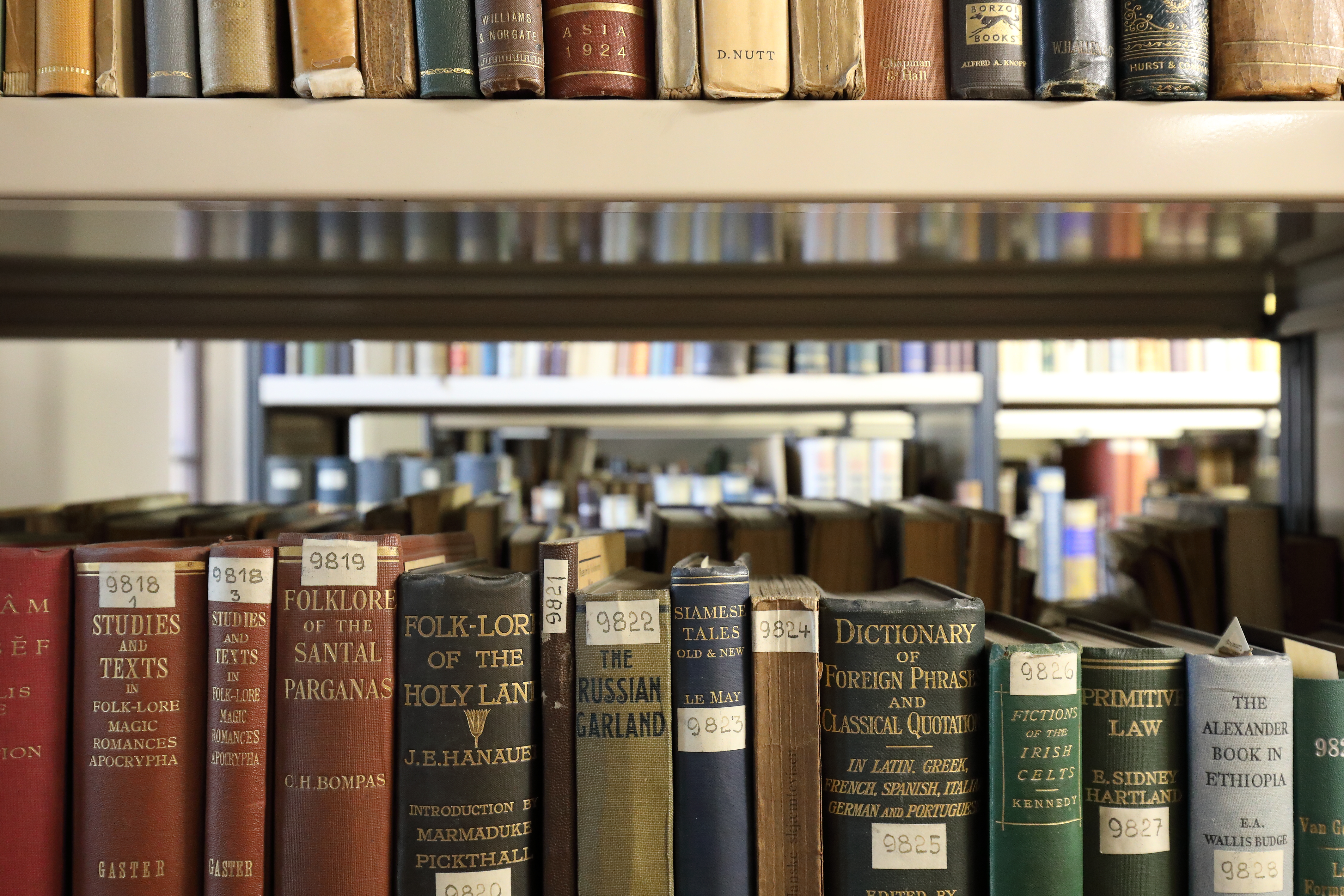 Buchspeicher der Bibliothek des Österreichischen Museum für Volkskunde im 8. Wiener Gemeindebezirk Josefstadt.